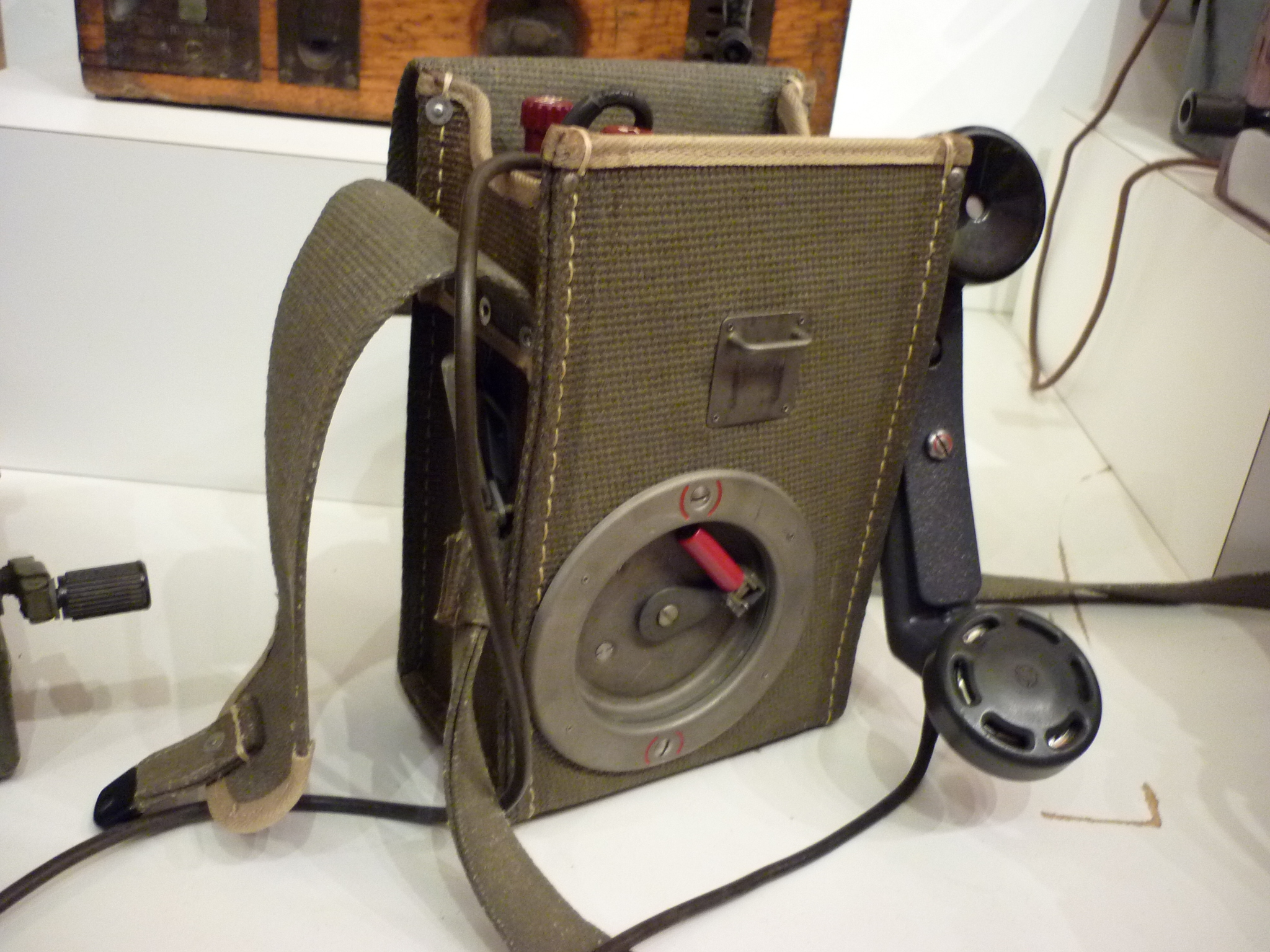 Feldtelefon 50, Telefonmuseum Islikon TG, Schweiz